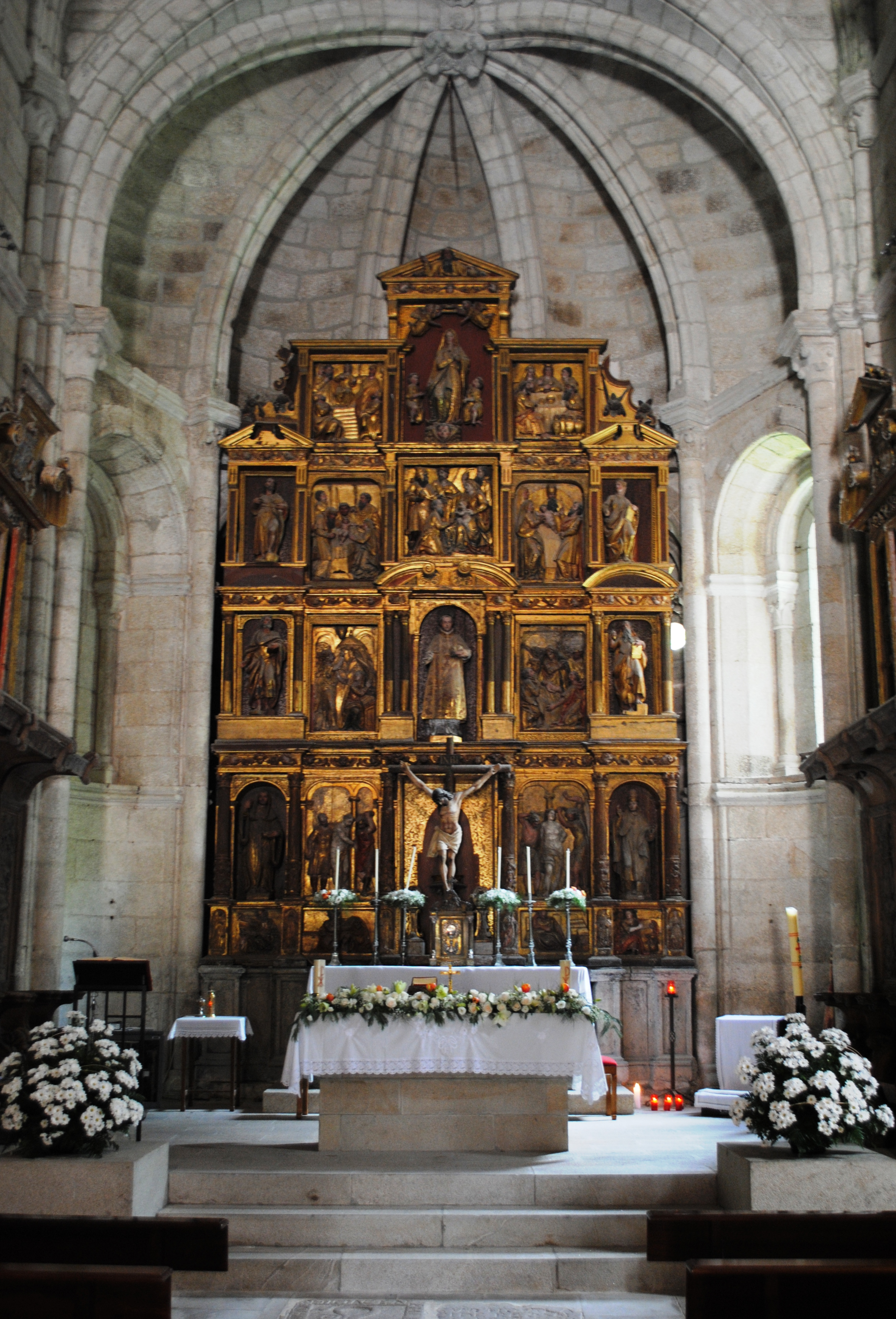 Vexa o título e as categorías.